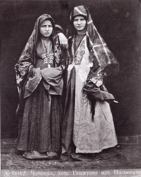 Chechen women